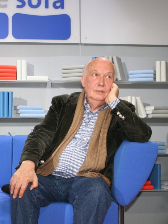 Kunsthistoriker Werner Hofmann auf dem Blauen Sofa der Frankfurter Buchmesse, mit seinem Buch "Phantasiestücke - Über das Phantastische in der Kunst"